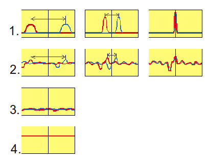 Ces différents schémas permettent de comparer différents cas (source ponctuelle, source quelconque contrastée ou peu contrastée, surface uniforme) et de montrer où se trouve la difficulté pour calculer le bon déphasage.